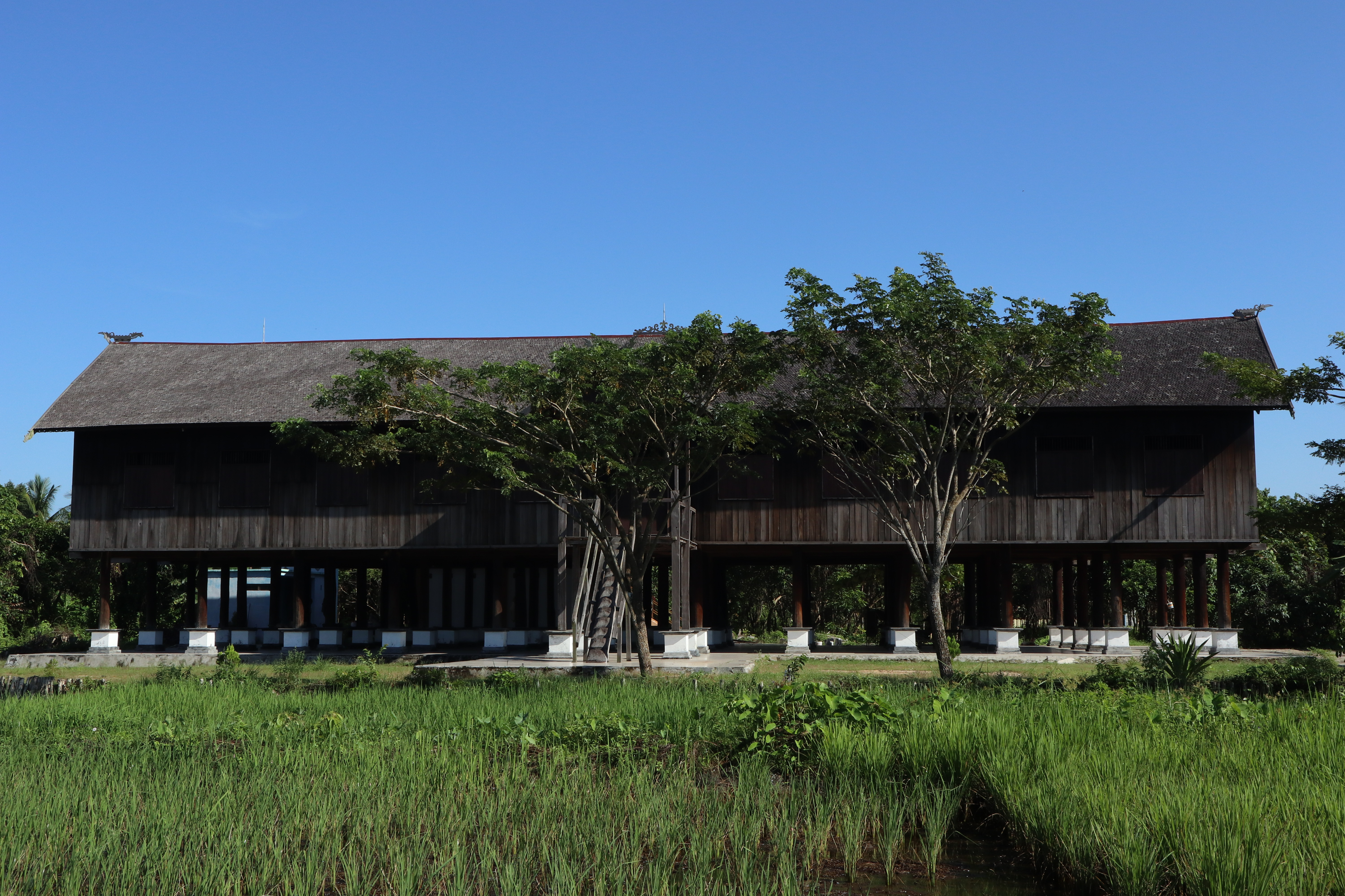 Rumah Betang Sei Pasah di kecamatan Kapuas Hilir, Kabupaten Kapuas, Kalimantan Tengah.